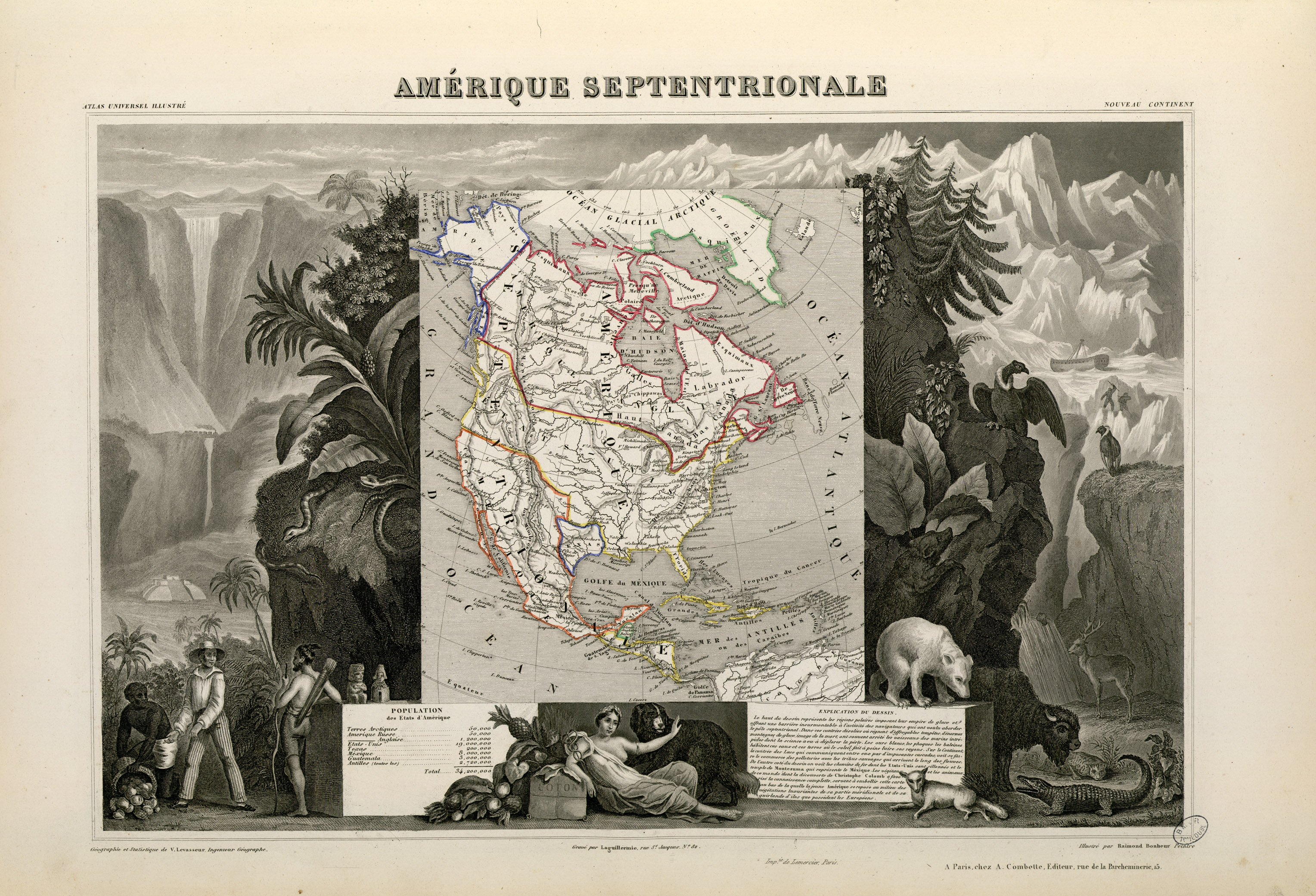 Titre complet du recueil : Atlas national illustré des 86 Départements et des Possessions de la France divisé par Arrondissements, Cantons et Communes avec le tracé de toutes les routes, chemins de fer et canaux. Dressé d'après les Travaux du Cadastre du Dépôt de la Guerre et des Ponts et Chaussées par V. Levasseur, Ingénieur Géographe attaché au Génie du Cadastre et de la Ville de Paris. Gravé sur acier par les meilleurs artistes. Imprimerie de Lemercier à Paris ou imprimerie Dupuich à Paris. Page de titre et 100 pl. en n. et b. et en coul. dont un tableau statistique et 2 cartes dépliantes. Ancely, René (1876 - 1966). Possesseur